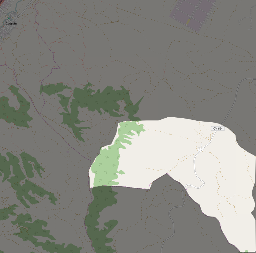 Mapa del distrito de Torrecilla de Valmadrid en Zaragoza.